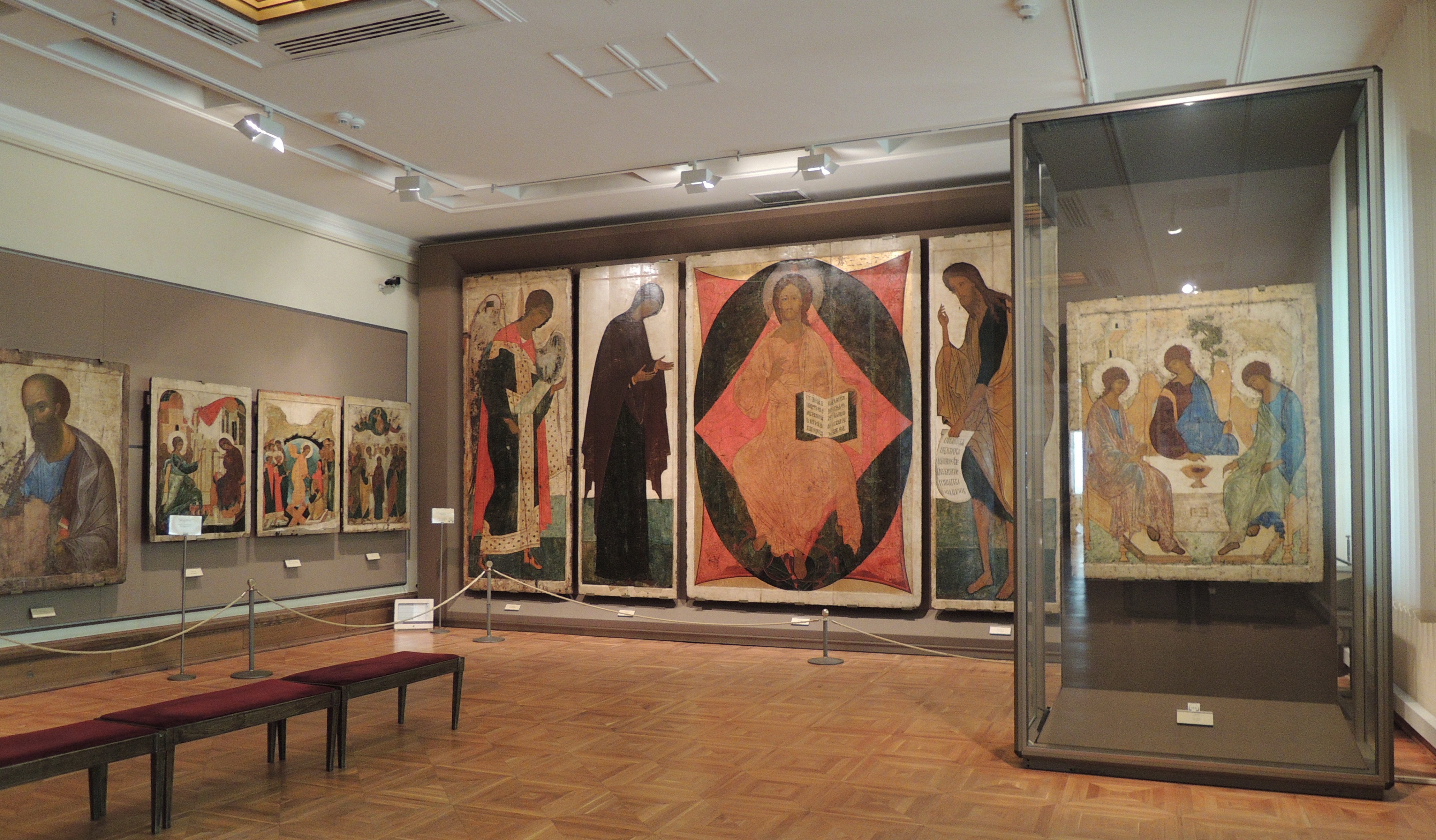 Третьяковская галерея